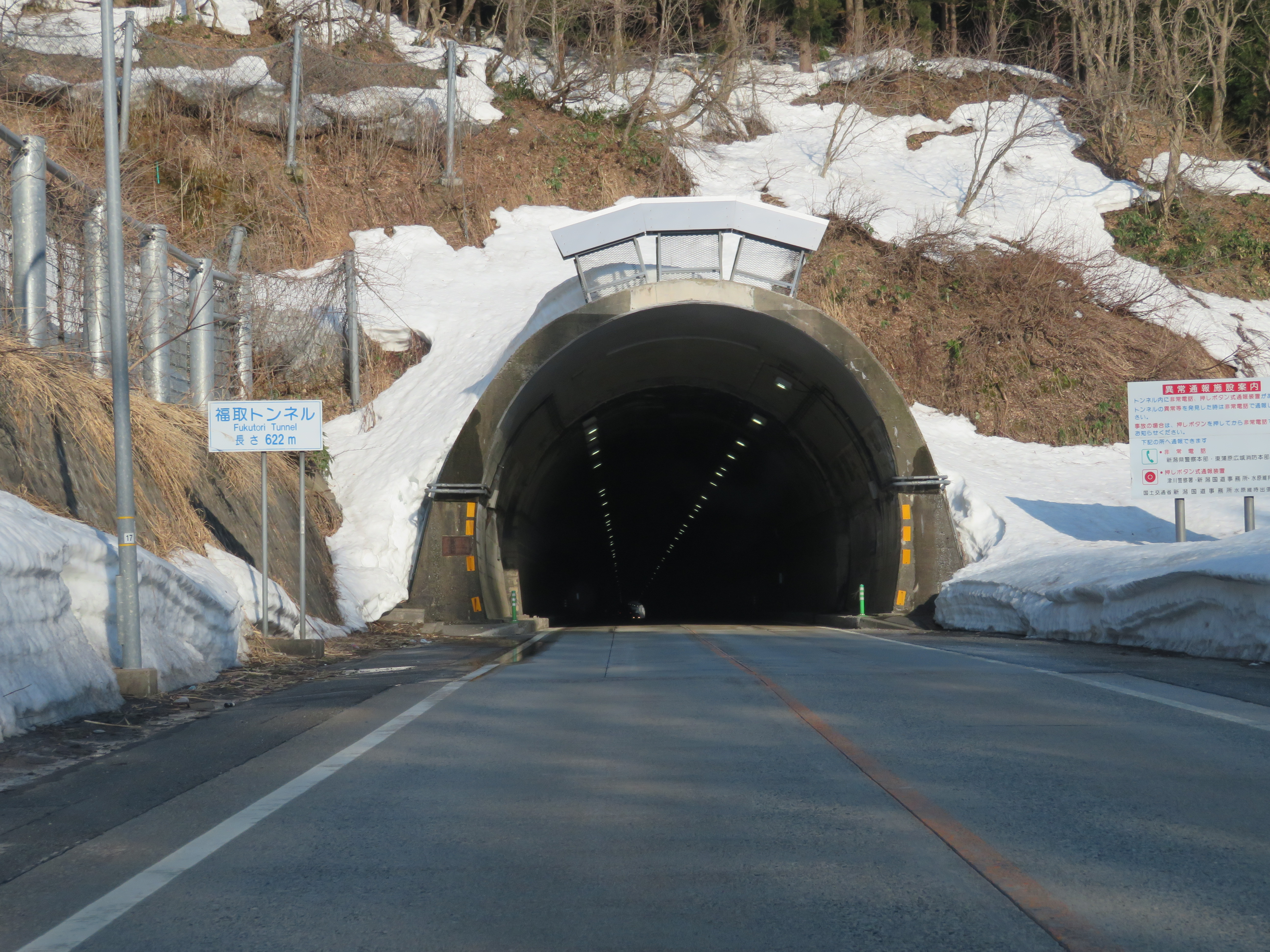 国道49号線福取トンネル（新潟市方面側坑口付近を撮影）